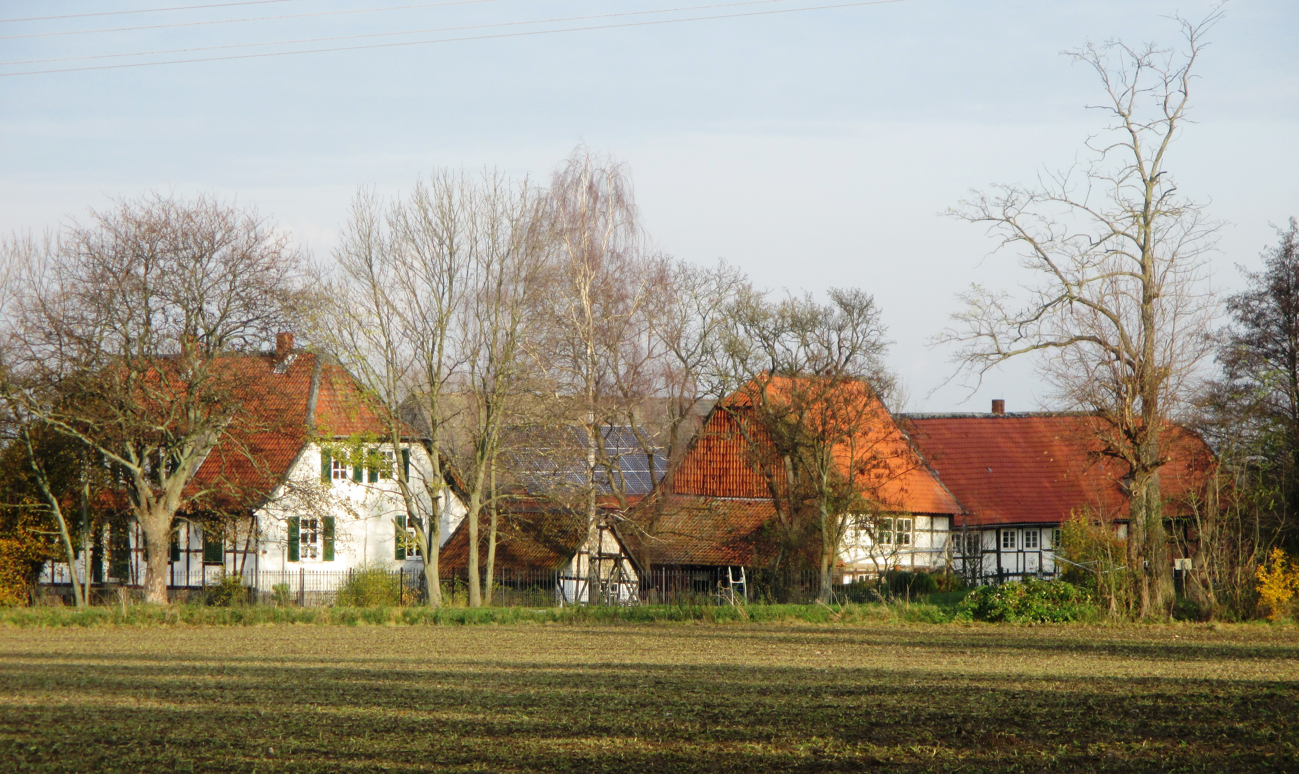 Untere Sukopsmühle bei Salzgitter-Bruchmachtersen